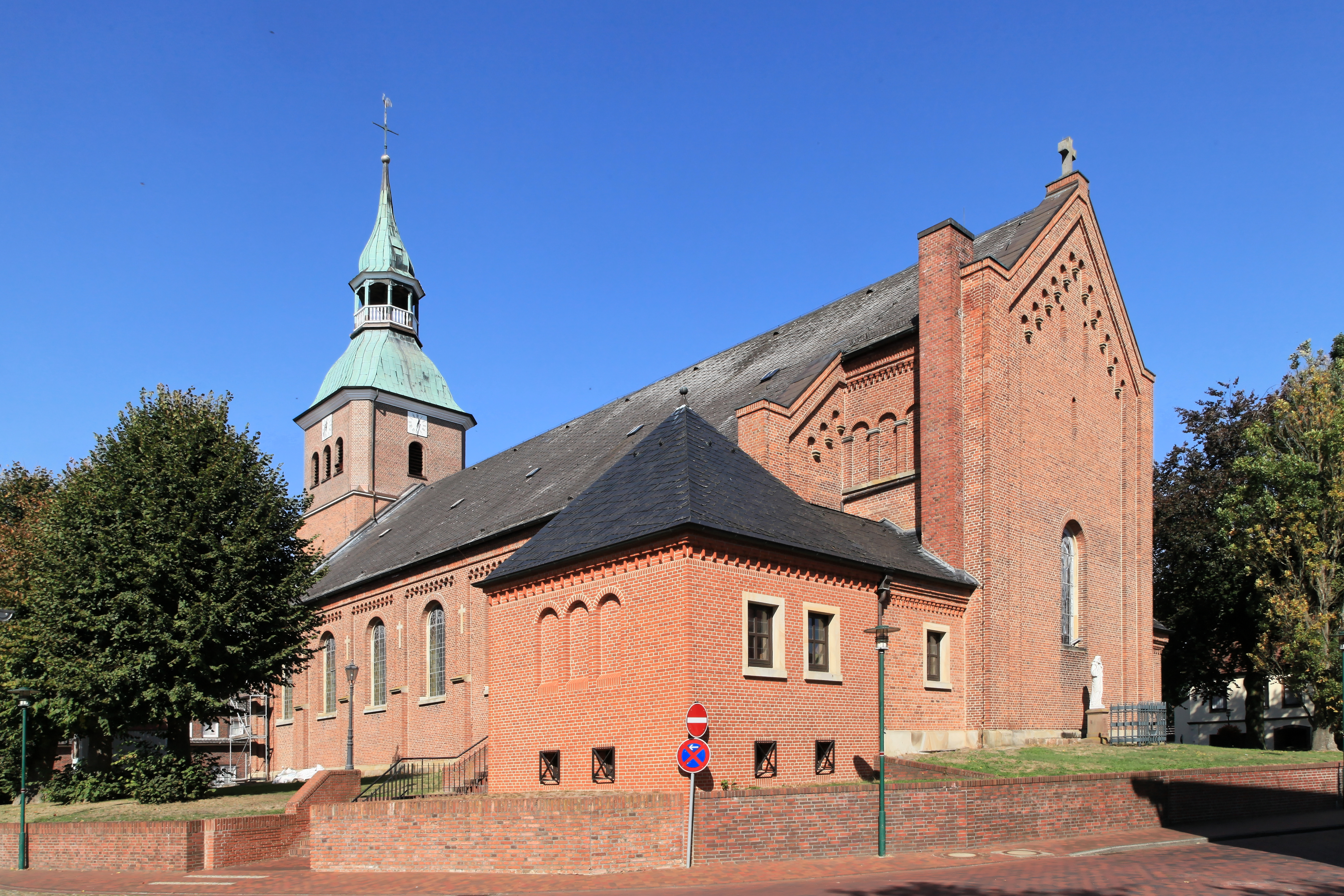 St. Cosmas und Damian, Hafenstraße/Elisabethstraße in Barßel